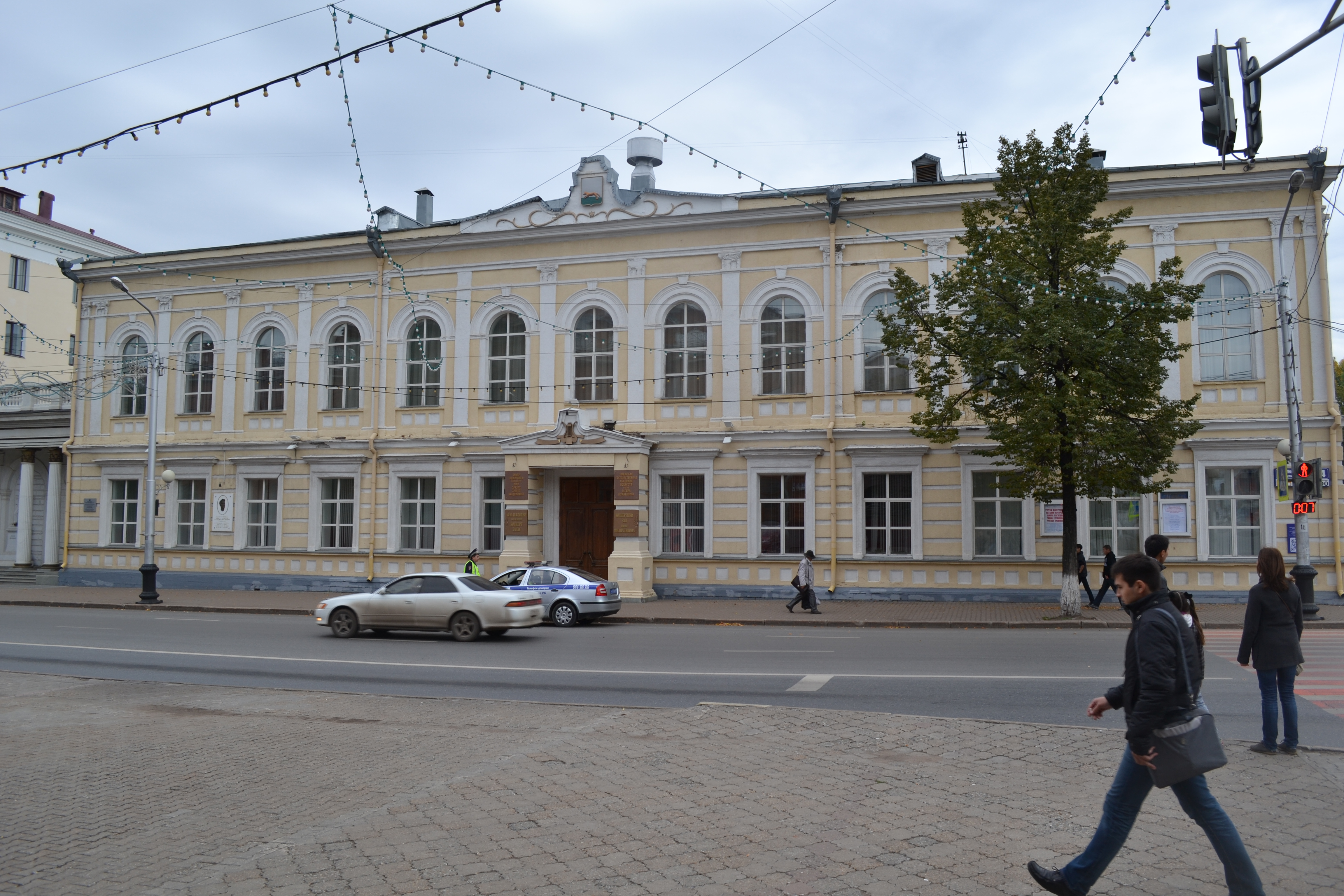 Здание дворянского собрания, здесь выступал Шаляпин Ф. И (Республика Башкортостан, Уфа, улица Ленина, 14)